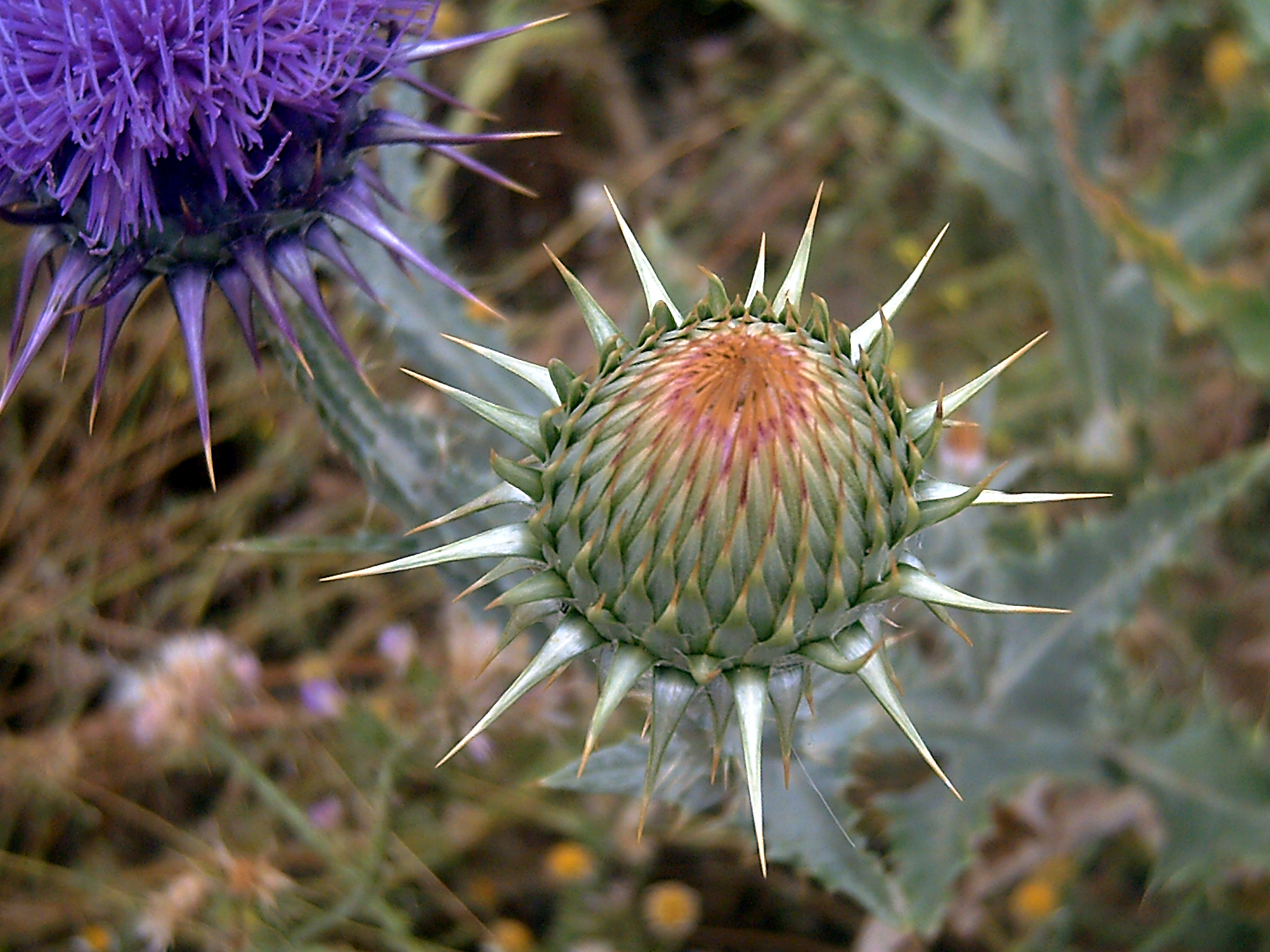 Onopordum macracanthum, in Caracuel, Castilla La Mancha, Spain